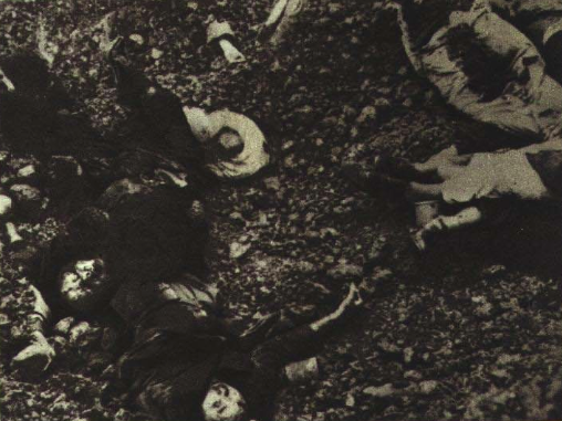 1950年，位于重庆的中美特种技术合作所内尸体